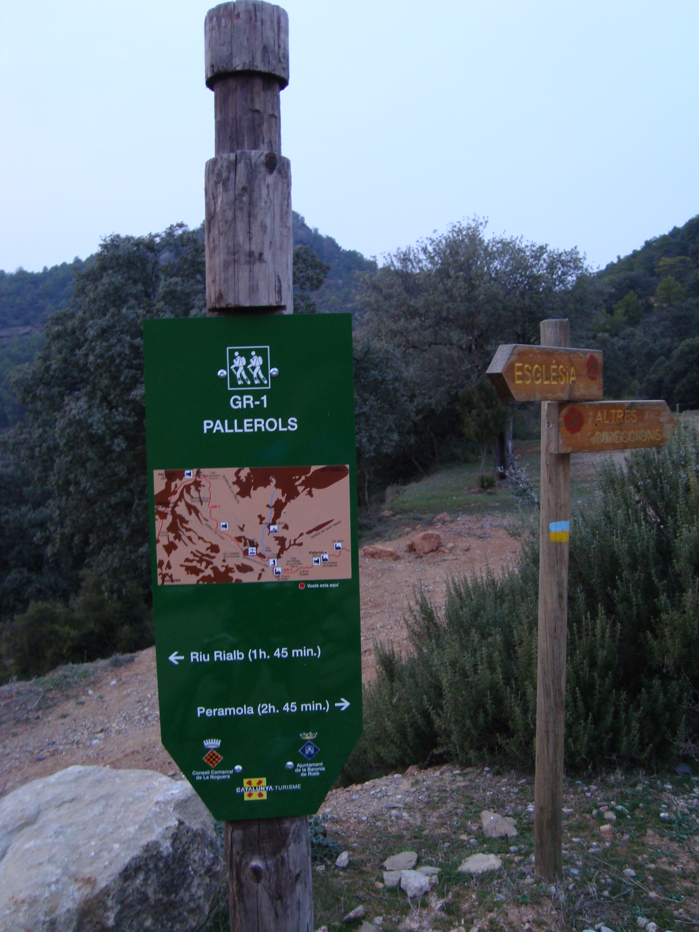 Señalización del GR-1 (Sendero de Gran Recorrido) en Pallerols (La Baronia de Rialb, Lleida)